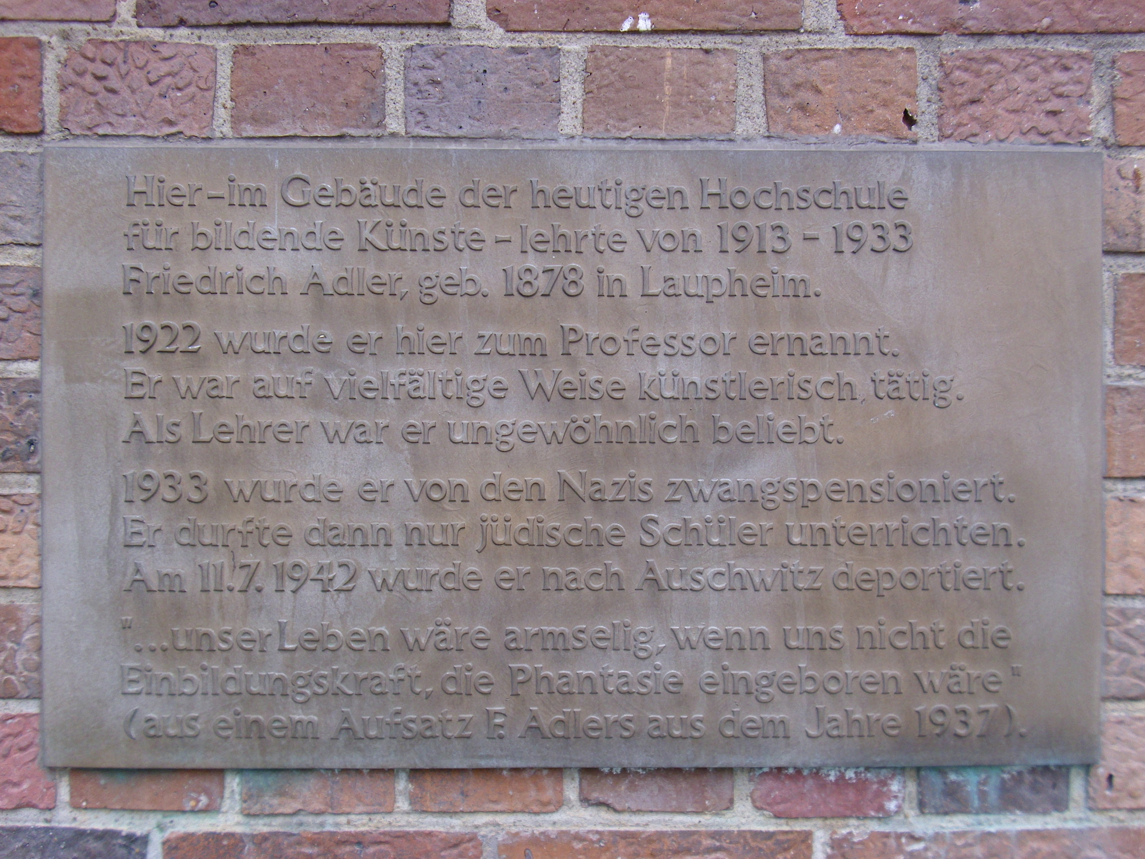 Gedenktafel für Friedrich Adler an der Hochschule für bildende Künste in Hamburg-Uhlenhorst.